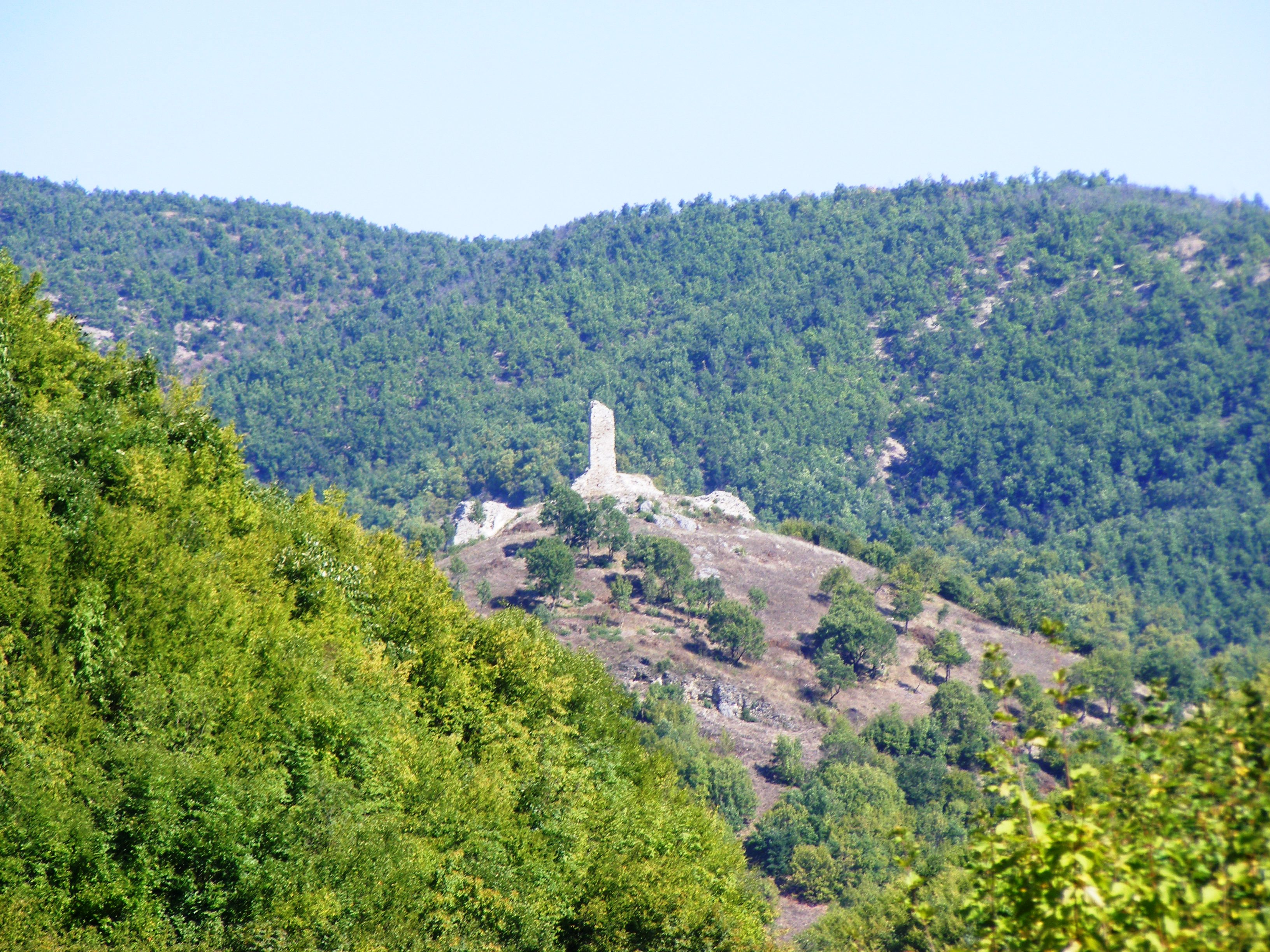 Kalaja në Pogragjë